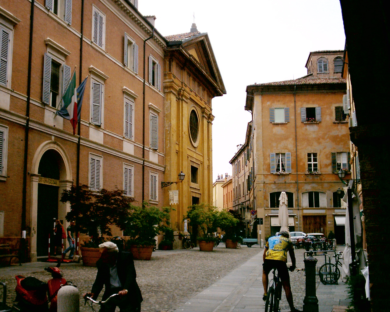 Modena Via Sant'Eufemia.